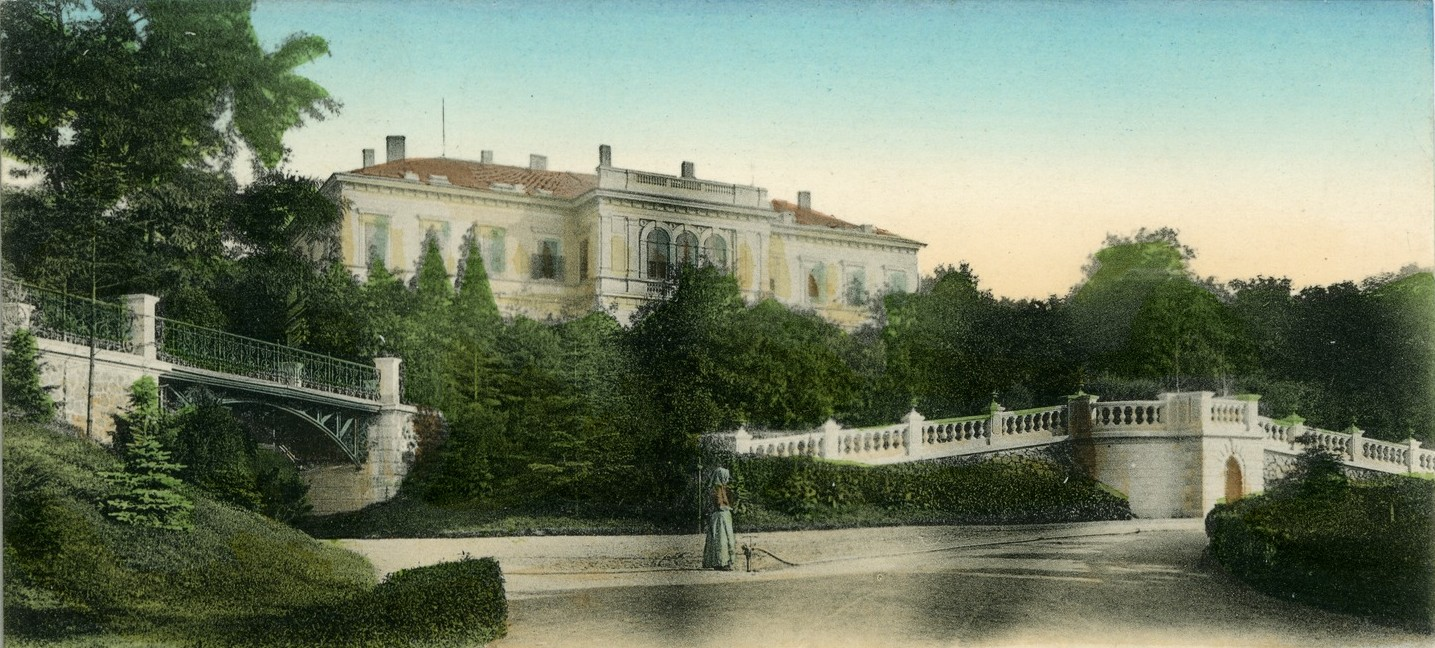 Lázeňský pavilón a most v Bílině.